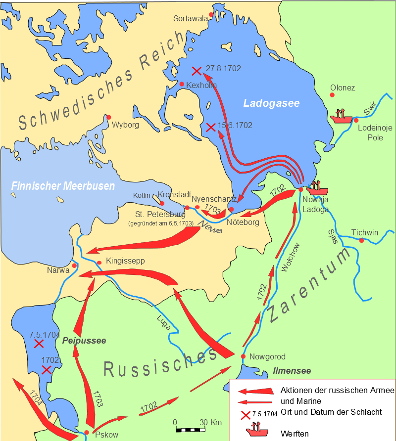 Kriegsschauplatz Ingermanland von 1700 bis 1704 im Großen Nordischen Krieg, abgebildet sind die russischen Vorstöße in das schwedische Kerngebiet.